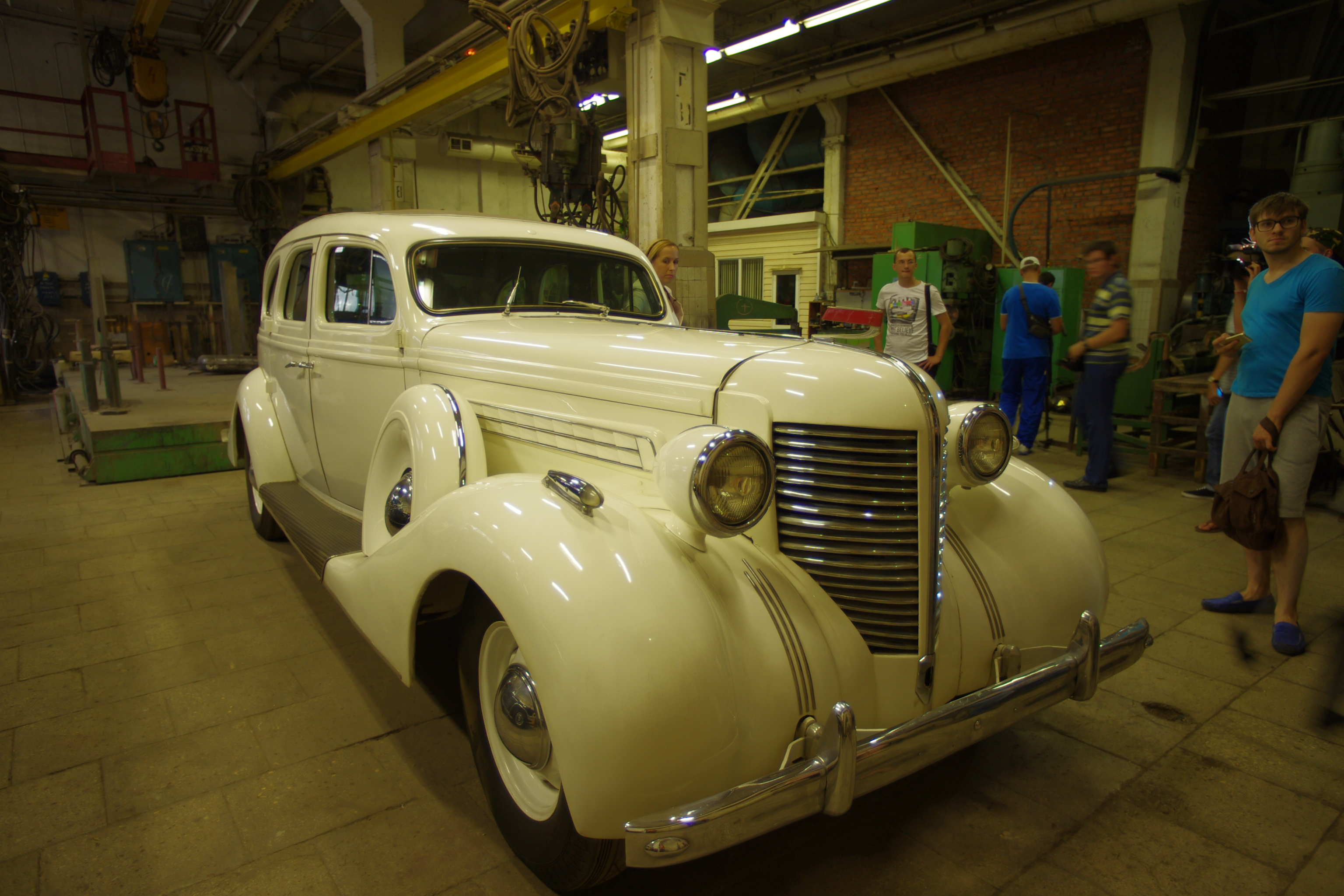 Экскурсия на ЗИЛ